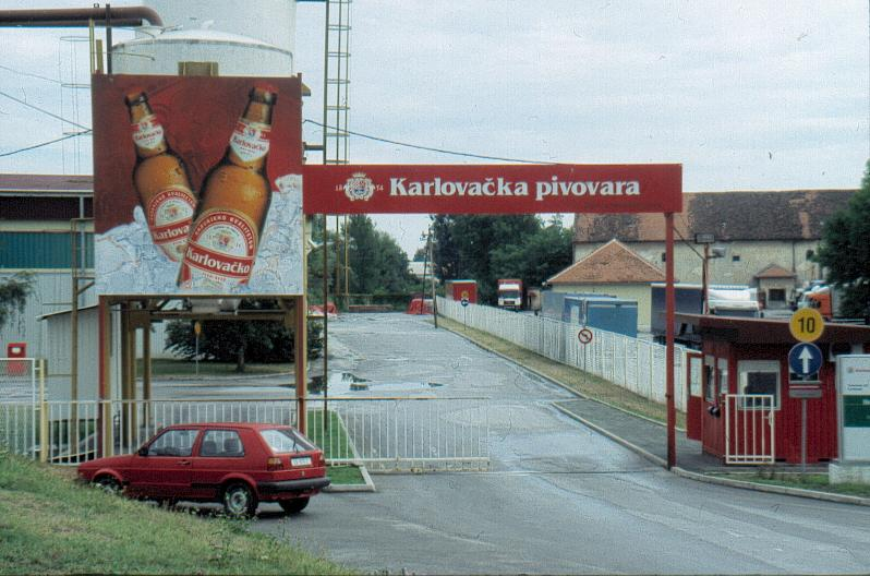 Eigen opmame augustus 2006